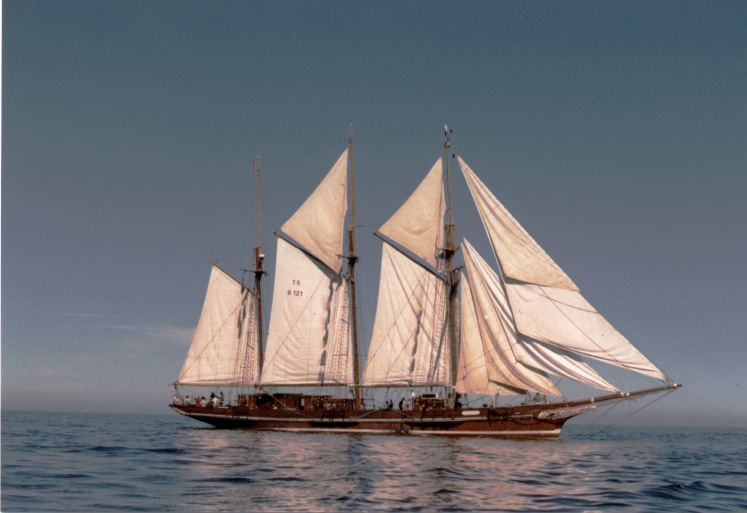 Das Segelschiff Amphitrite auf der Ostsee